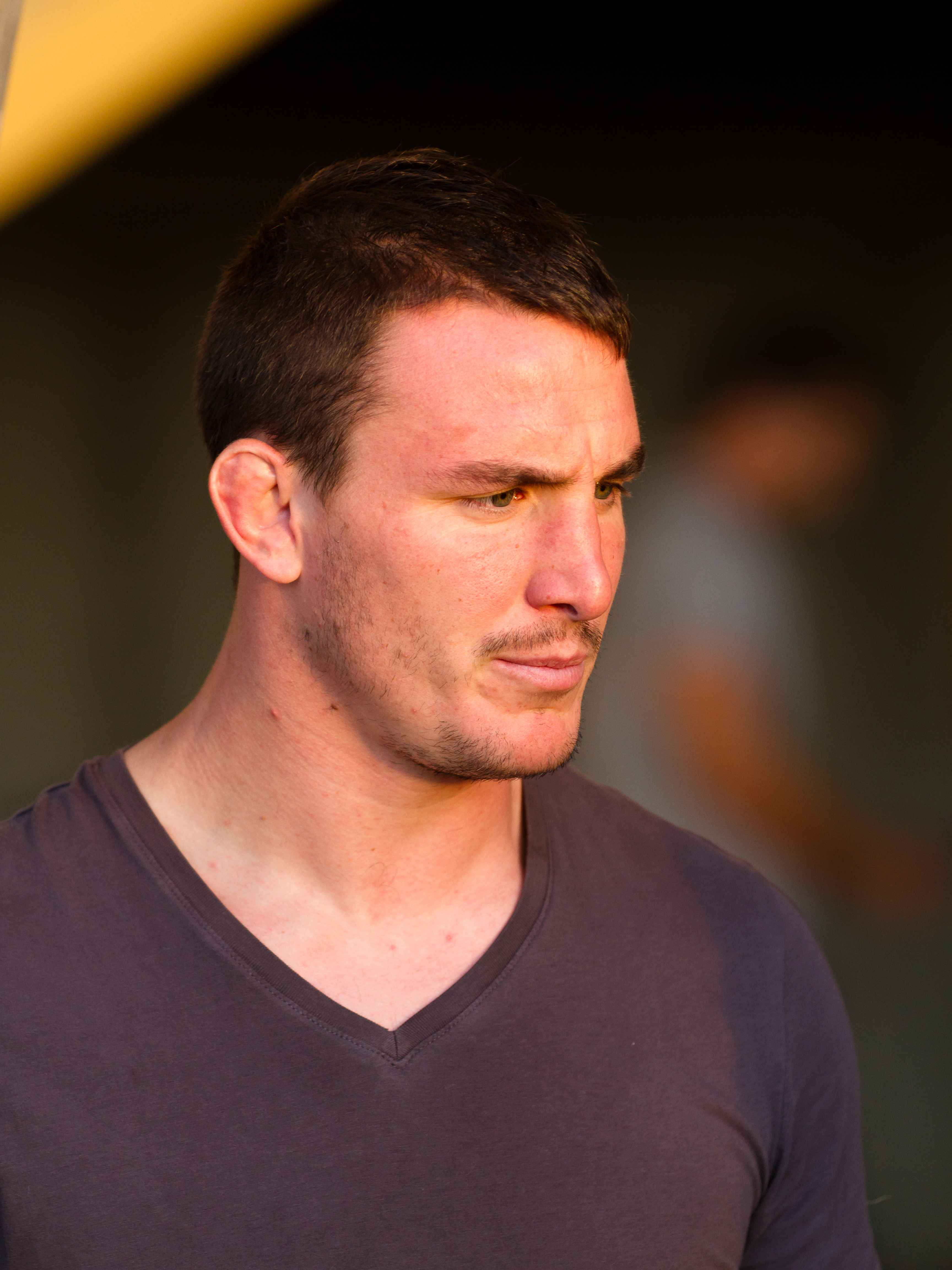 Entrainement du 24 septembre à 18h au Stade Ernest-Wallon